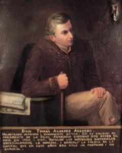 Retrato de Tomás Álvarez de Acevedo Ordaz, Gobernador del Reino de Chile entre 1780 y 1787-1788. La Colecciòn de Retratos de los Presidentes del Coloniaje. The collection of Portraits of the Governors of Chile is in the Museo Histórico Nacional (Chile) and was commissioned by Benjamín Vicuña Mackenna for the 1873 Colonial Exhibition and painted by various artists. It replaces a series of portraits of Chile's colonial governors dating from the colonial era which was destroyed during the wars for independence. [1].